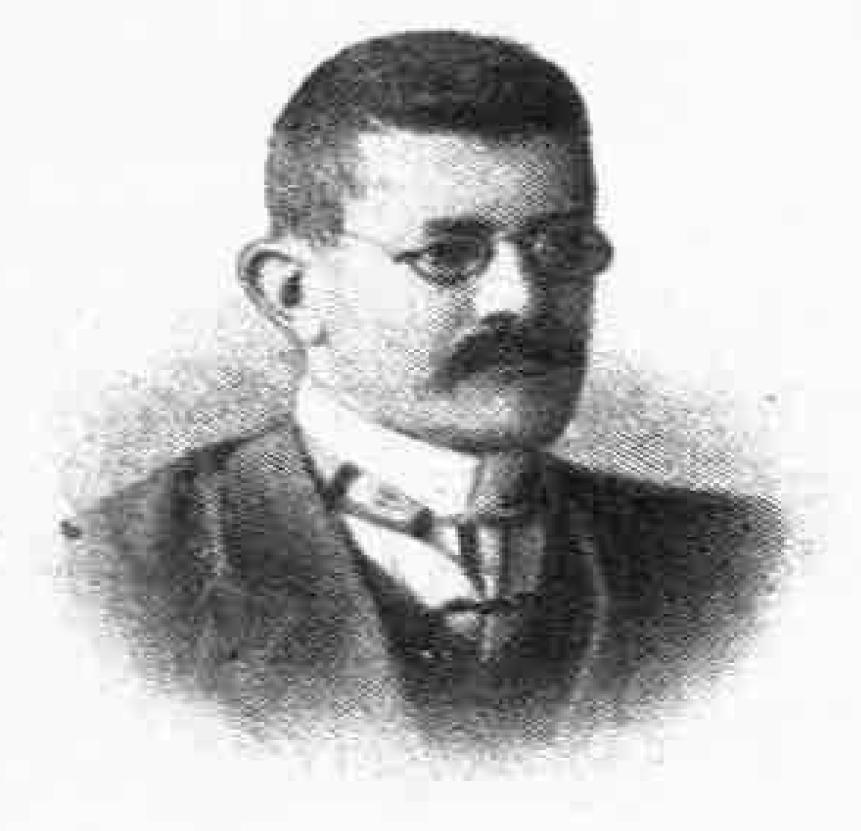 griechischer Universitätsprofessor, 19. Jahrhundert